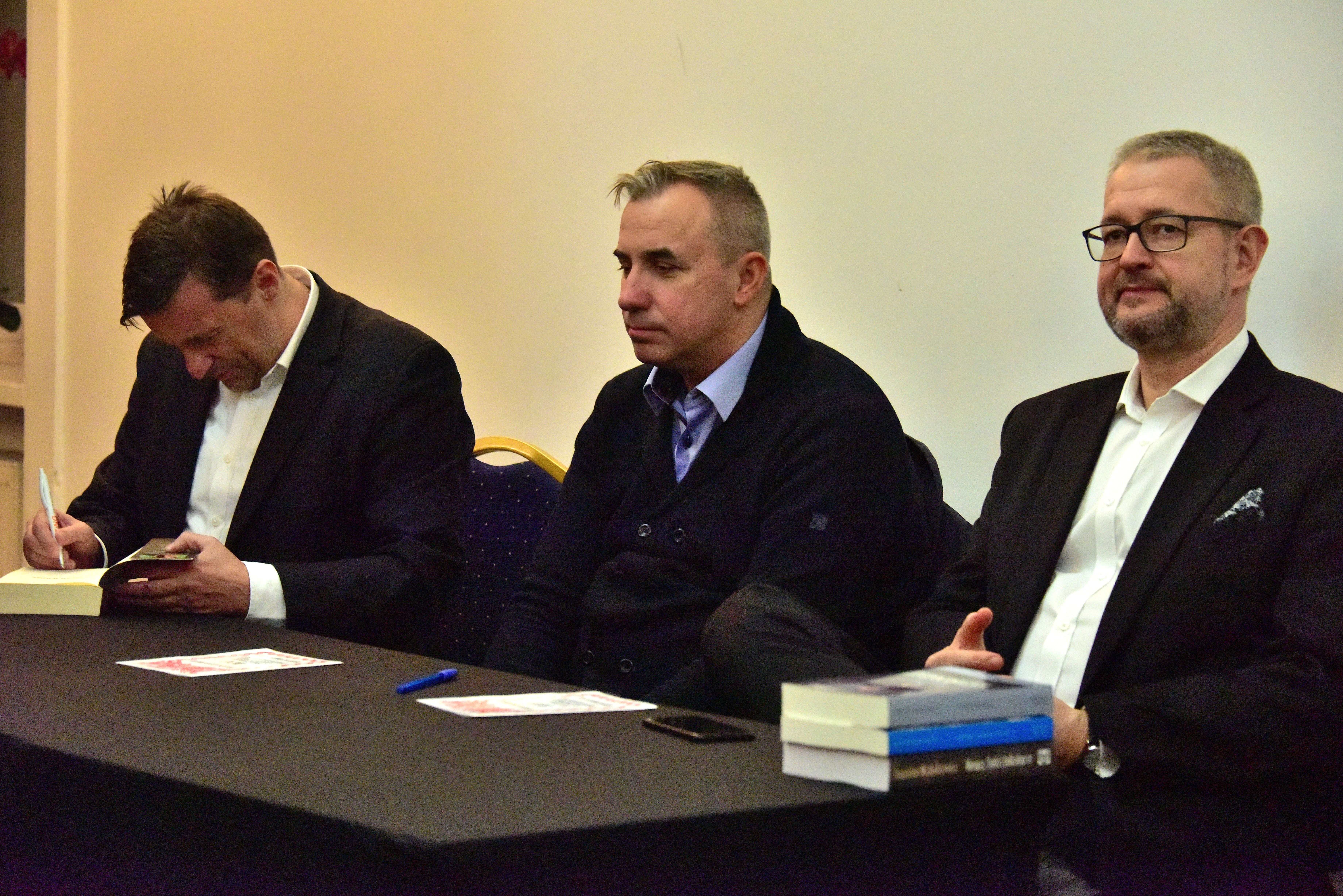 Witold Gadowski, Wojciech Sumliński i Rafał Ziemkiewicz podczas spotkania z czytelnikami w Centrum Prasowym Foksal przy ul. Fokal 3/5 w Warszawie